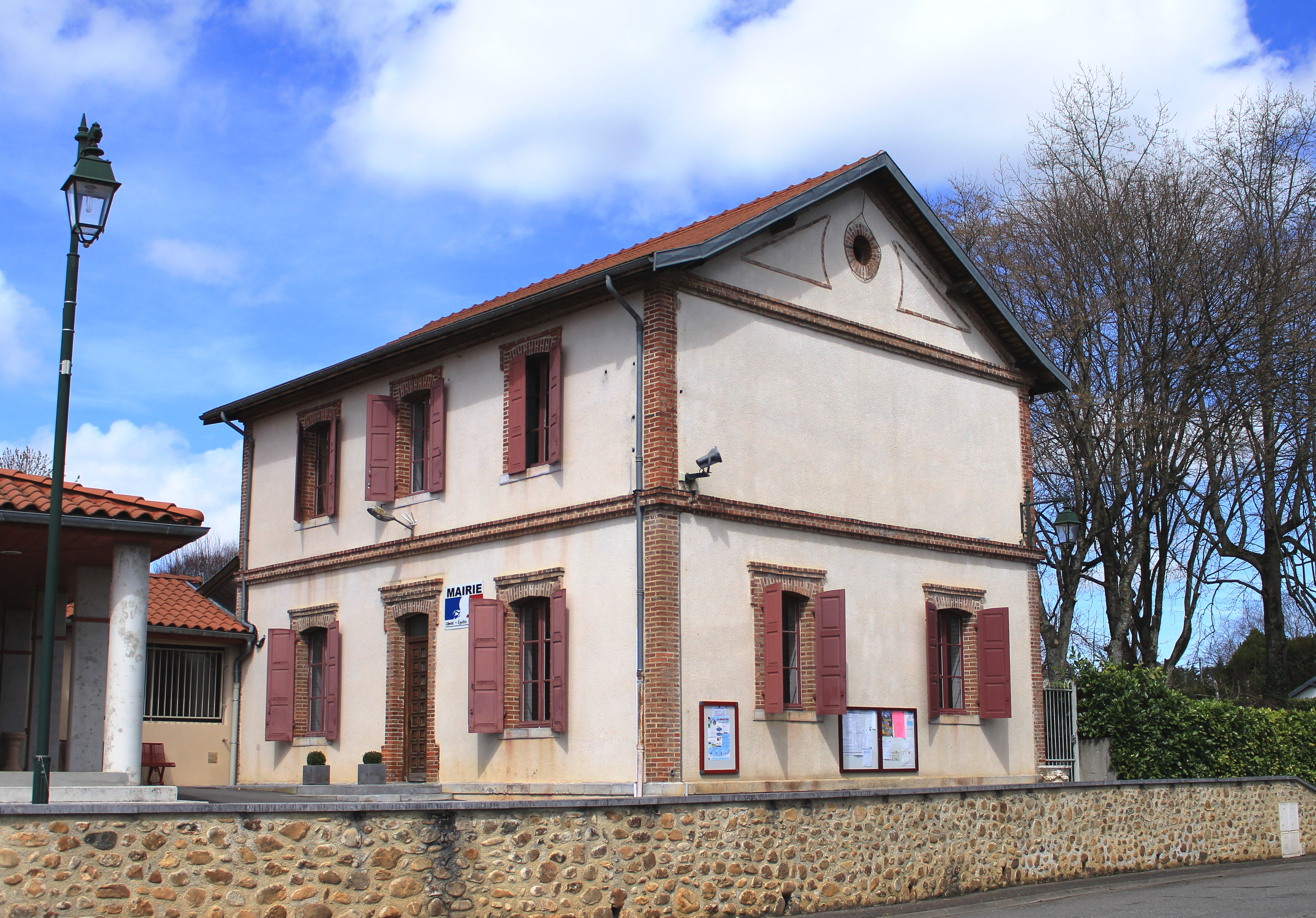 Mairie de Clarens (Hautes-Pyrénées)